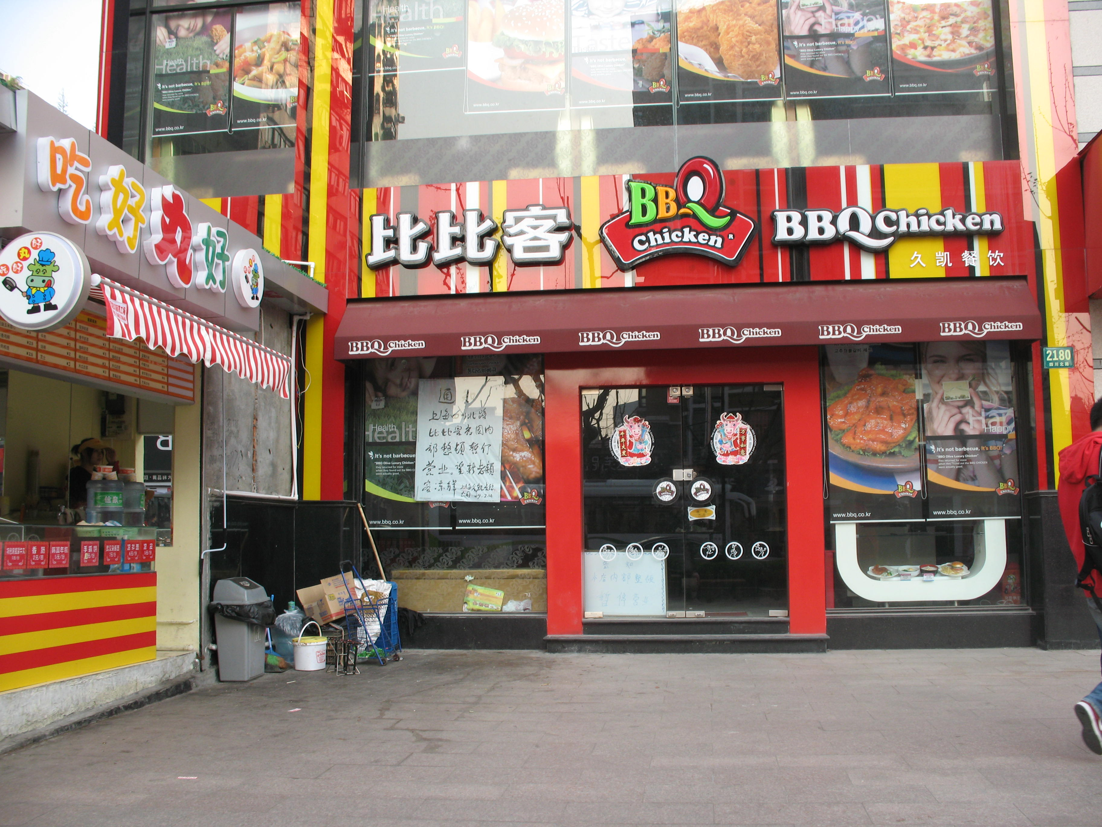 BBQ Chicken -- Sichuan Bei Lu